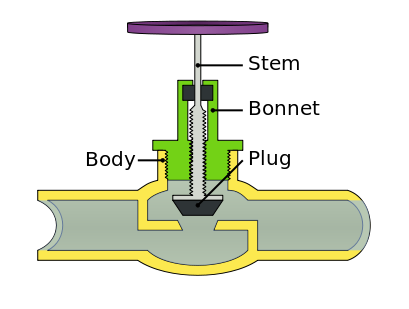 شکل شماتیک اجزاء و قطعات شیر بشقابی(کروی(